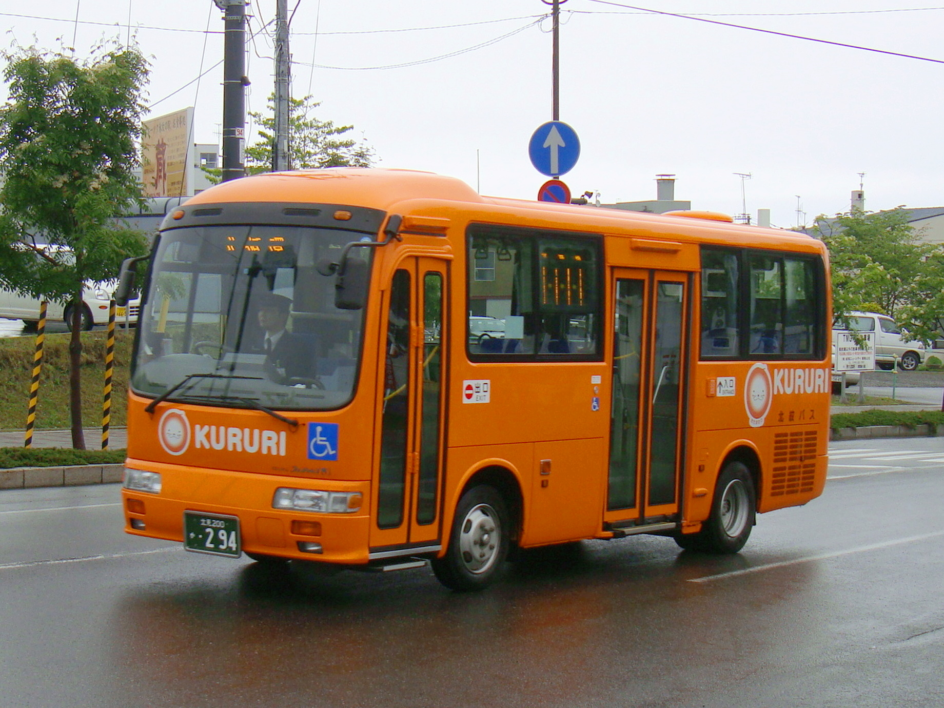 Monbetsu loop line